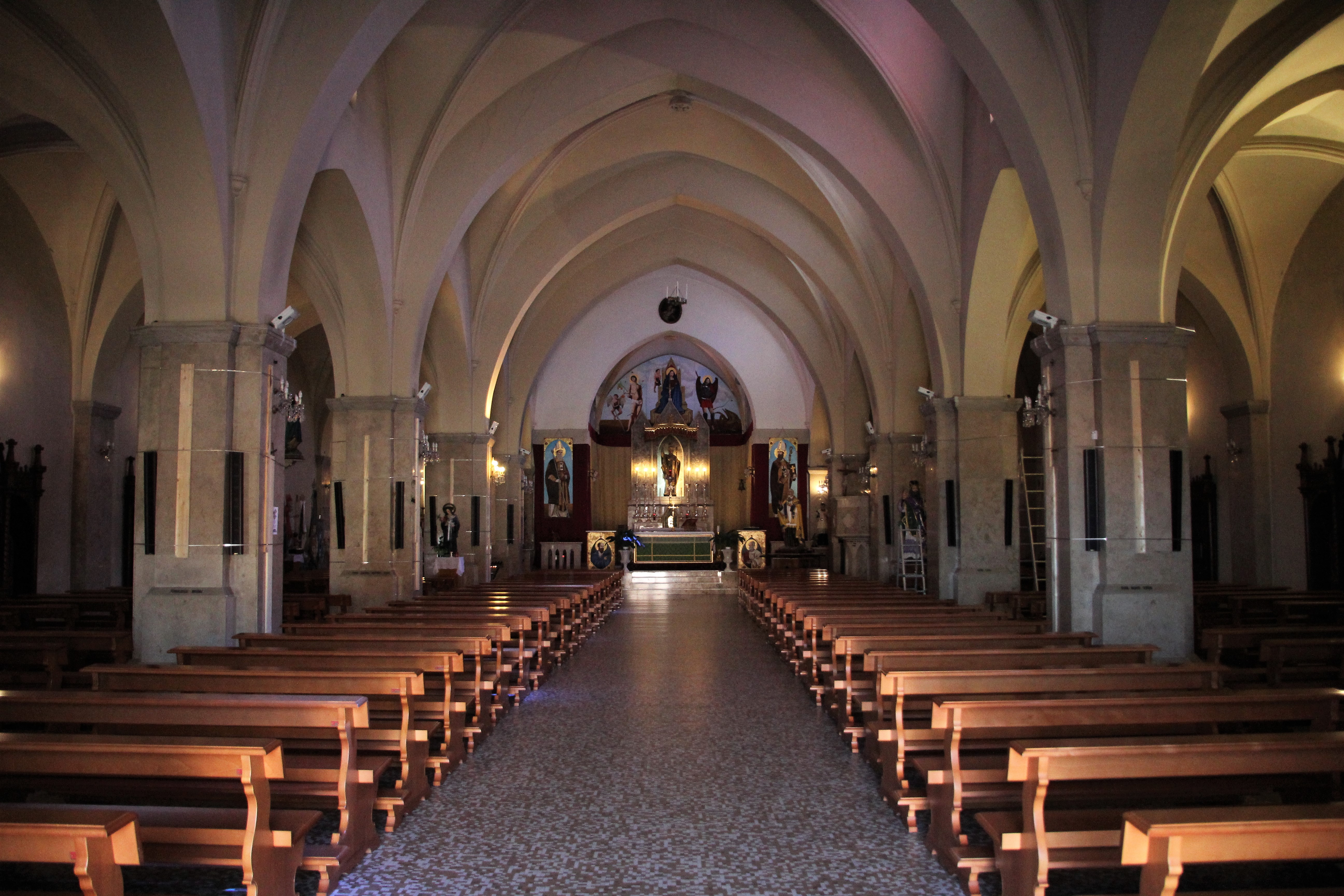 Sennori, chiesa di San Basilio This is a photo of a monument which is part of cultural heritage of Italy.